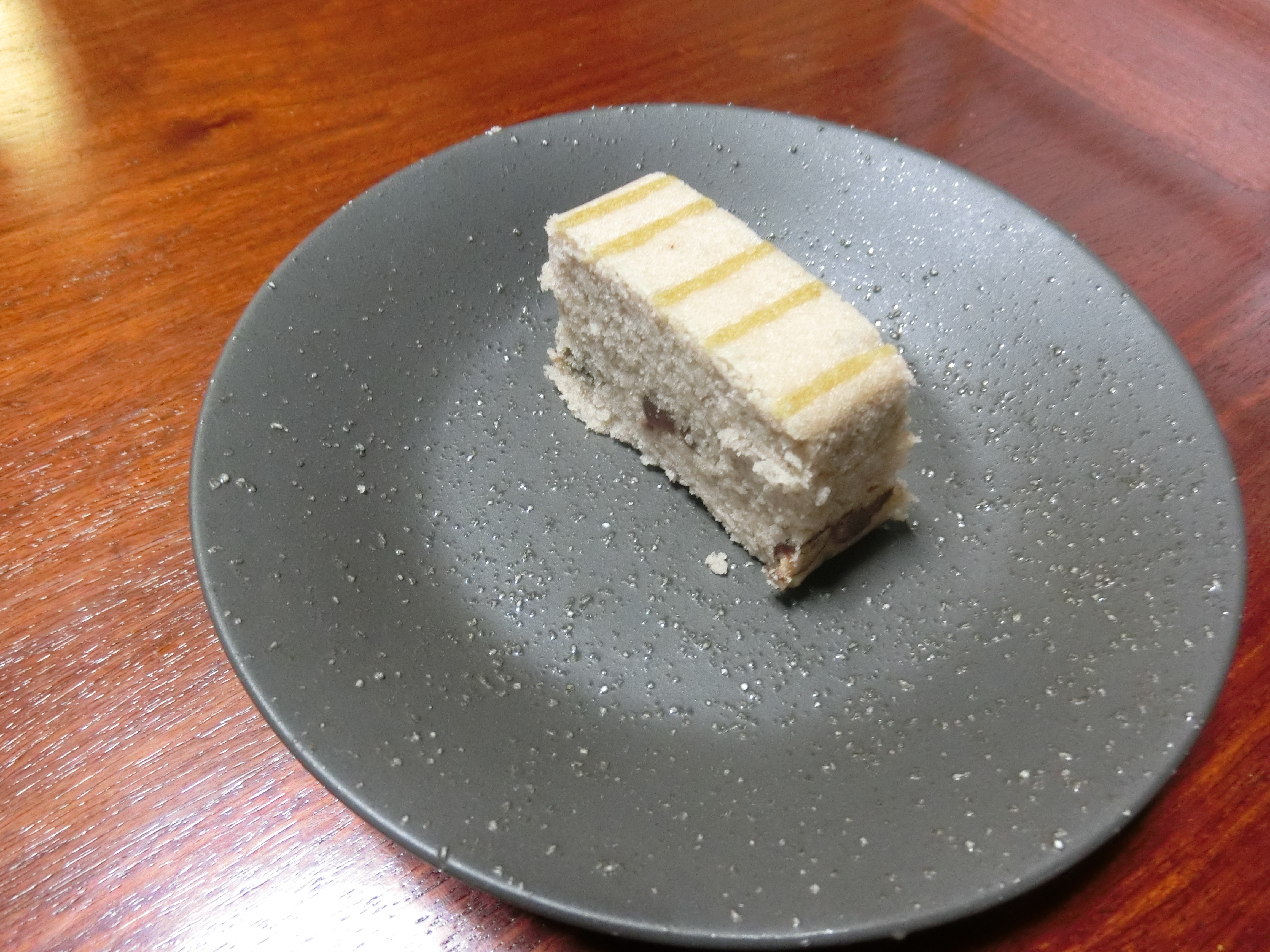 徳島県の和菓子